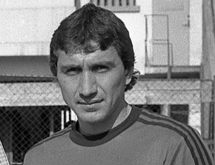 Ilie Bărbulescu (footballer)